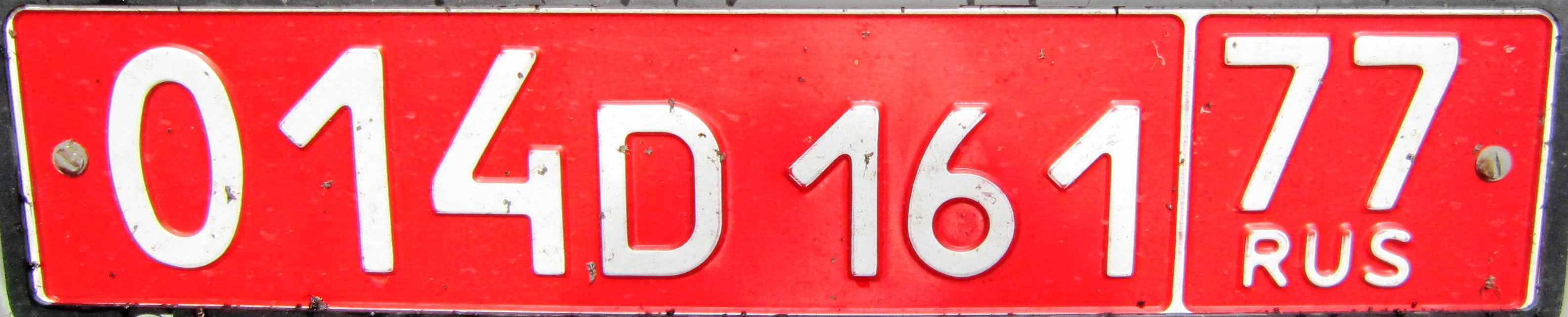 Rusland kenteken rood